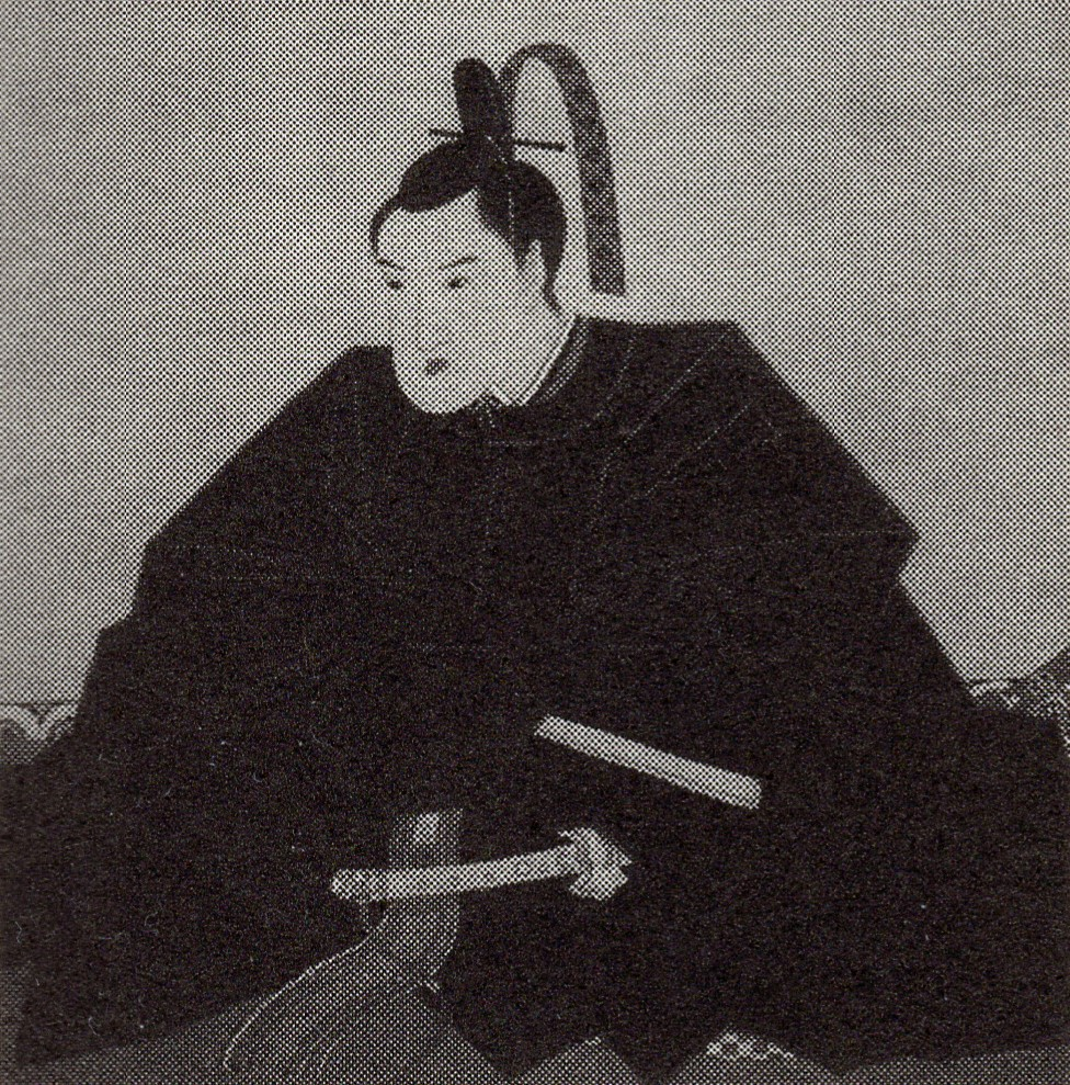 奥平昌猷の肖像(モノクロ)。